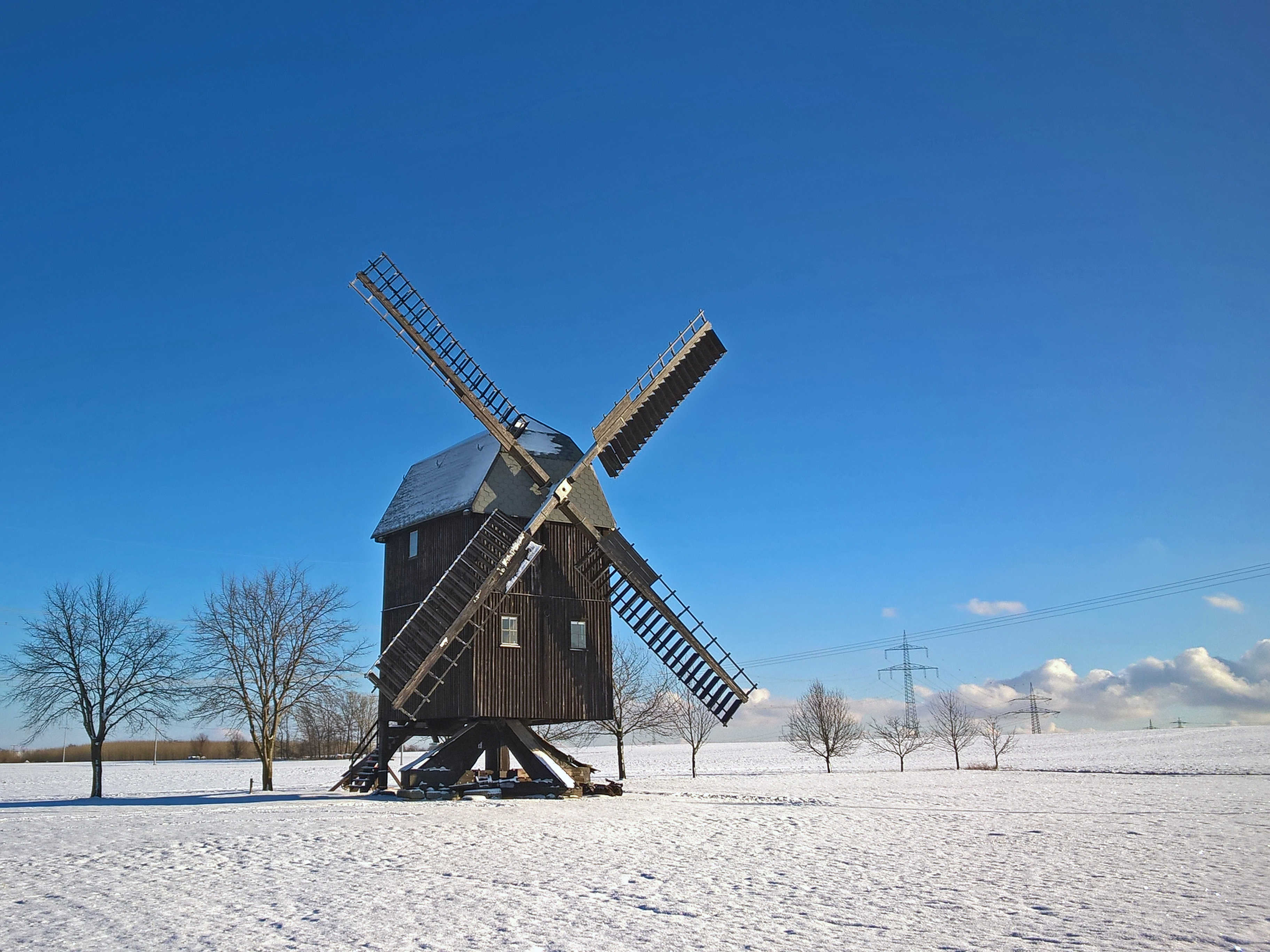 Bockwindmühle in Bechstedtstraß